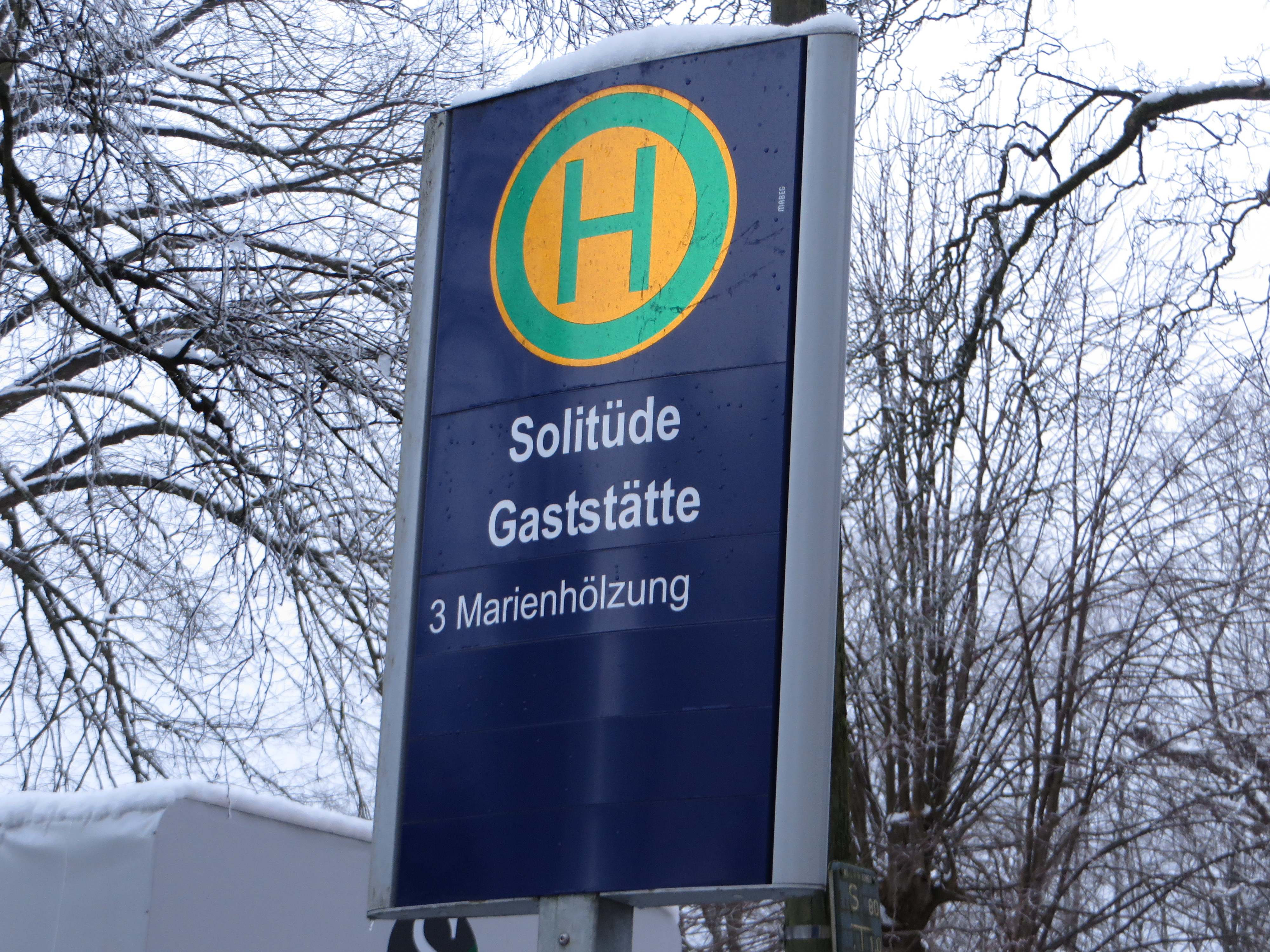 Busschild Gaststätte Solitüde im Winter (Flensburg-Mürwik Januar 2015)